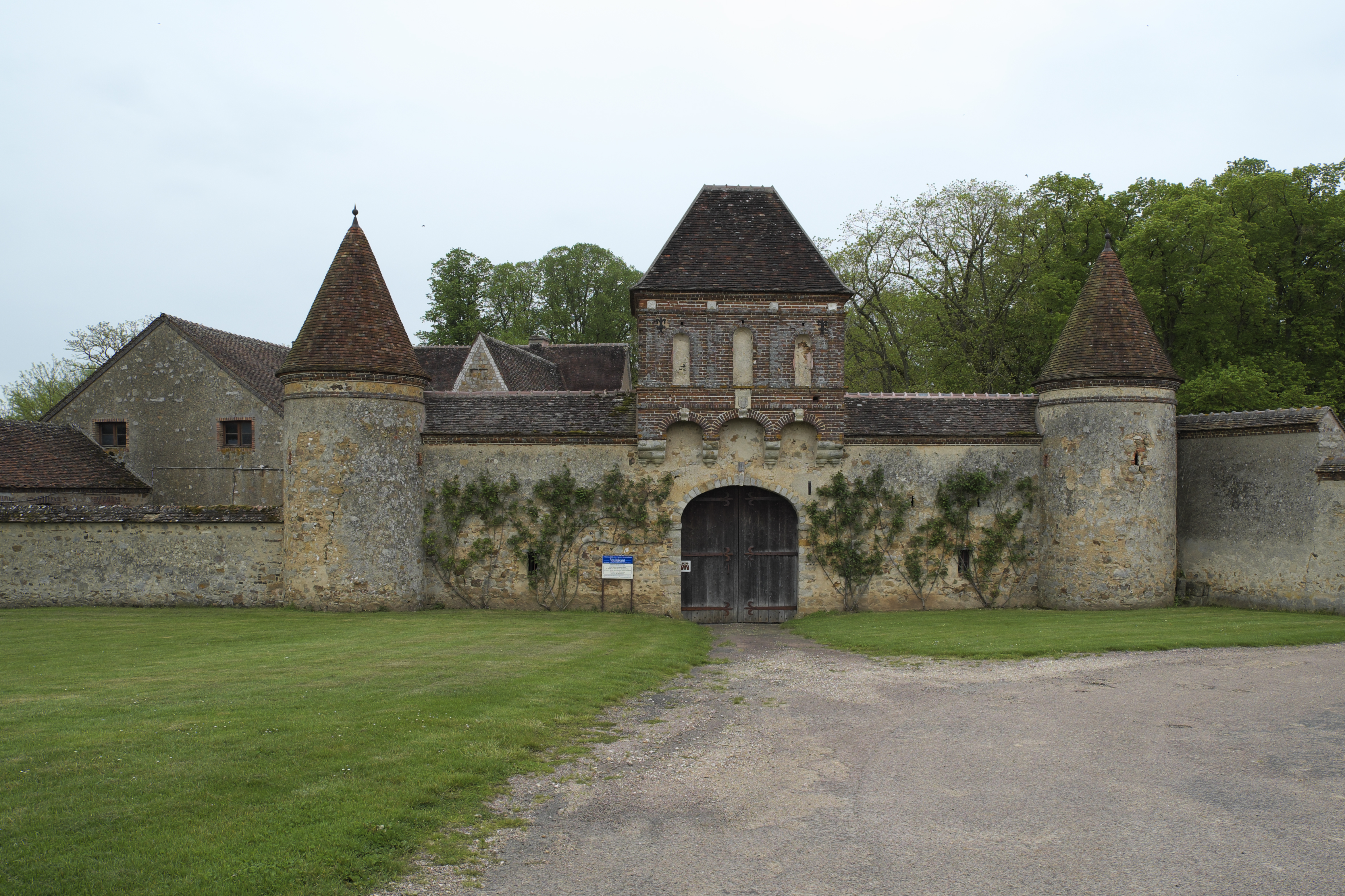 Ehemalige Zisterzienserabtei Vauluisant in der Gemeinde Courgenay im Département Yonne (Burgund/Frankreich), Torhaus